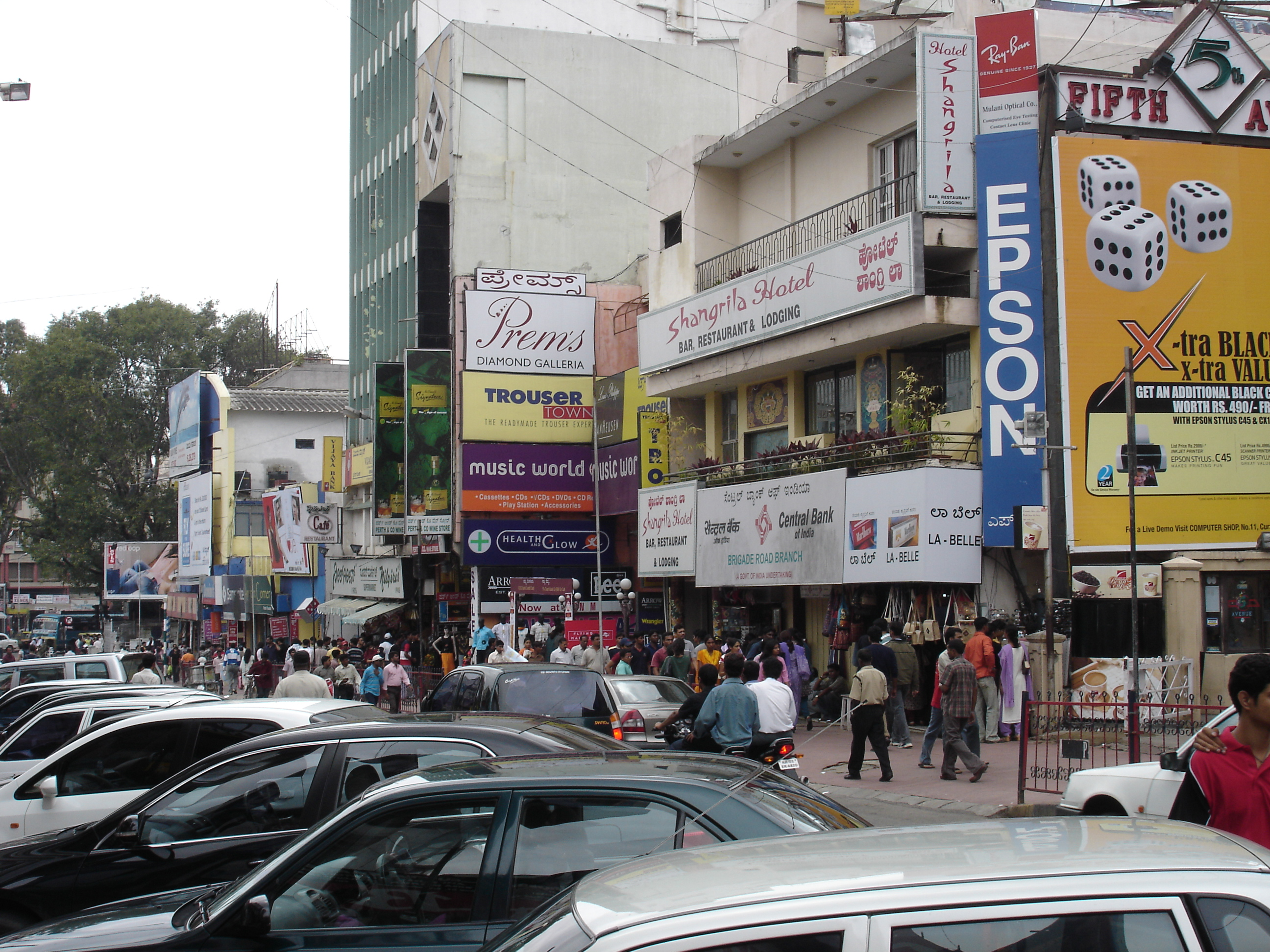 Shopping Street at Bangalore, India